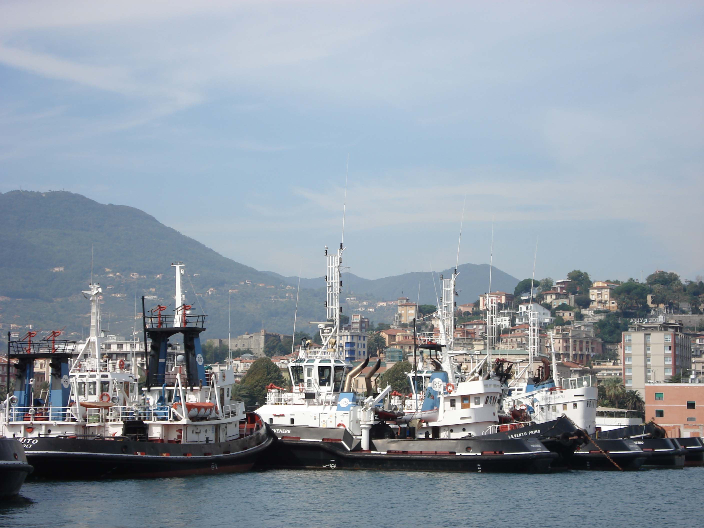 Rimorchiatori in porto - La Spezia - Italia.